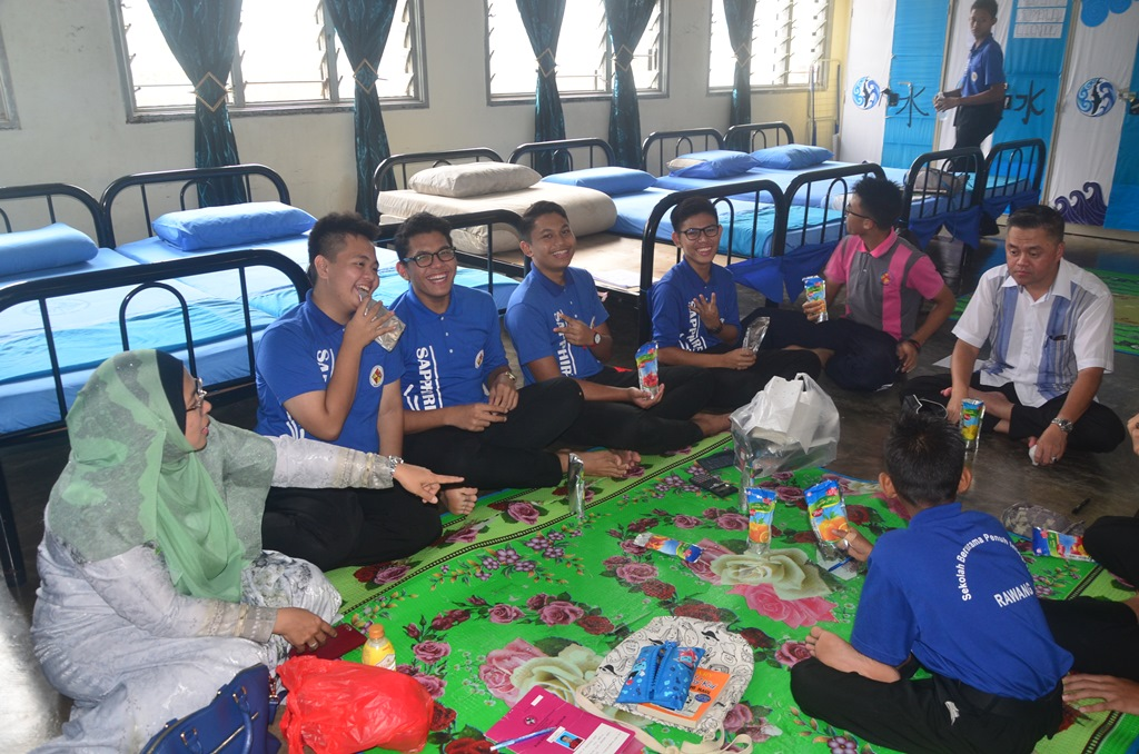 Para ibu bapa sedang bermesra dengan ahli kamar Biru 4 bersempena dengan Hari Terbuka Asrama (HTA) SEPINTAR 2017 pada 9 September 2017.